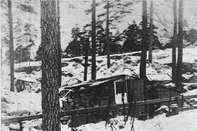 Kåkstad i Stadshagen 1900